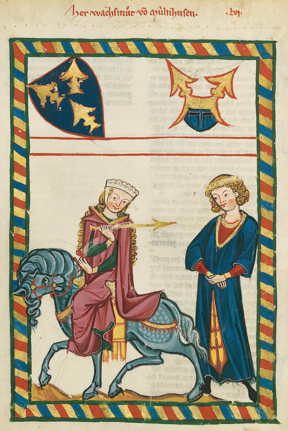 Codex Manesse, UB Heidelberg, Cod. Pal. germ. 848, fol. 183v: Wachsmut von Mühlhausen, deutscher Minnesänger in der Mitte des 13. Jahrhunderts